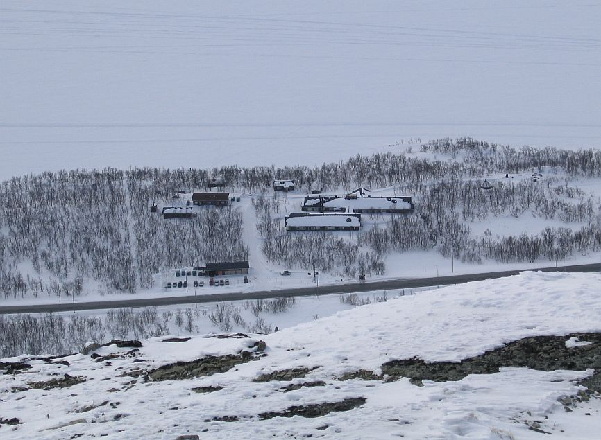 Helsingin yliopiston Kilpisjärven biologinen asema Saanalta nähtynä kevättalvella 2004. Kuvan yläosassa jäätynyt Kilpisjärvi (järvi). Huom: Muista säilyttää viittaus kuvaajaan, mikäli käytät kuvaa.